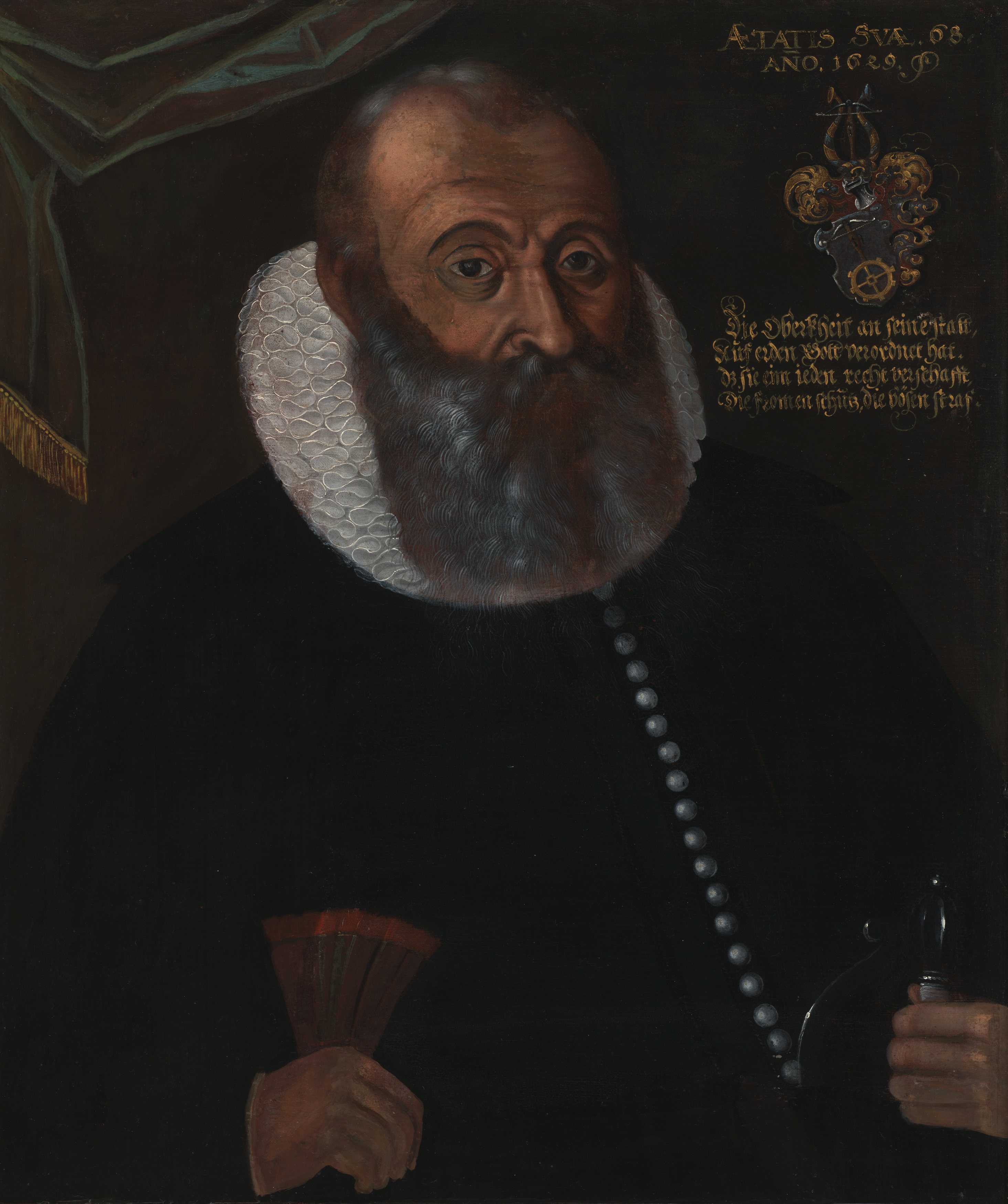 3. Landammann von Appenzell Ausserrhoden, Brustbildnis